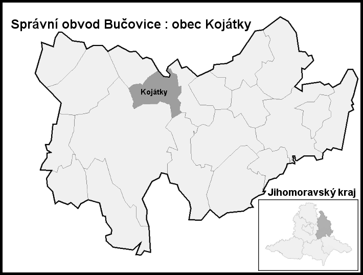 Hranice Kojátky (Vyškov-(Bučovice)- Czech republic)